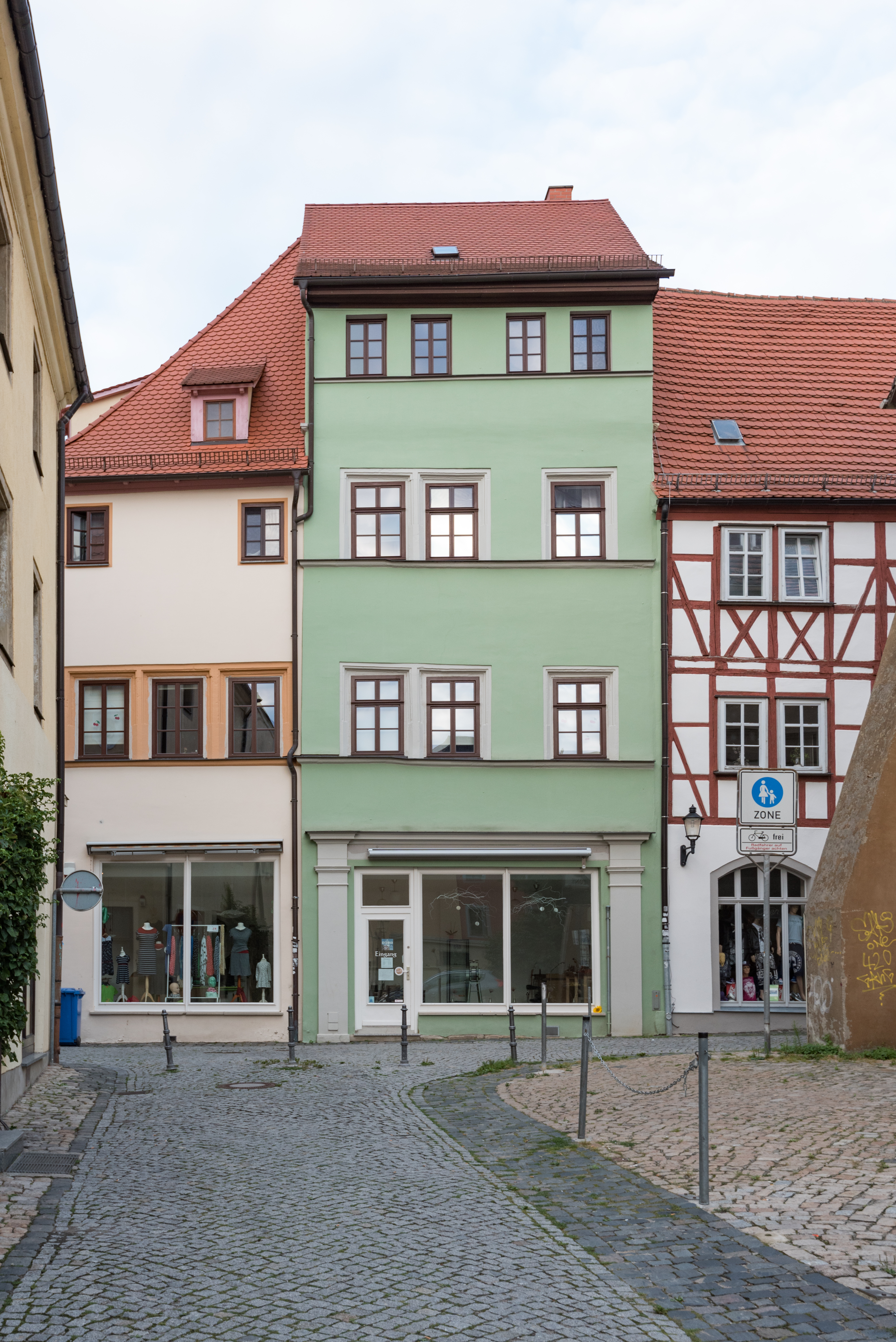 Naumburg (Saale), Engelgasse 20